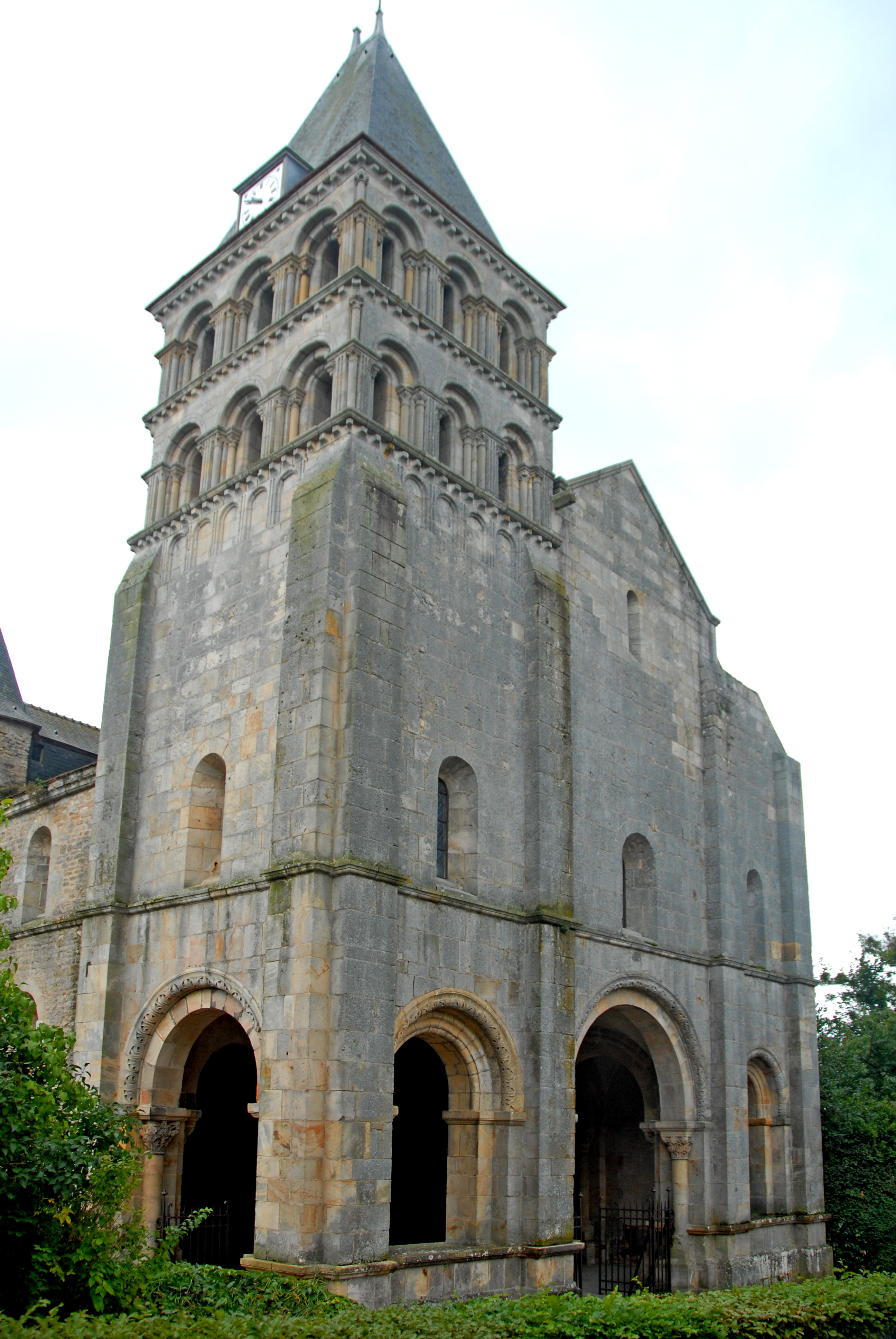 Abteikirche, Westwerk von W